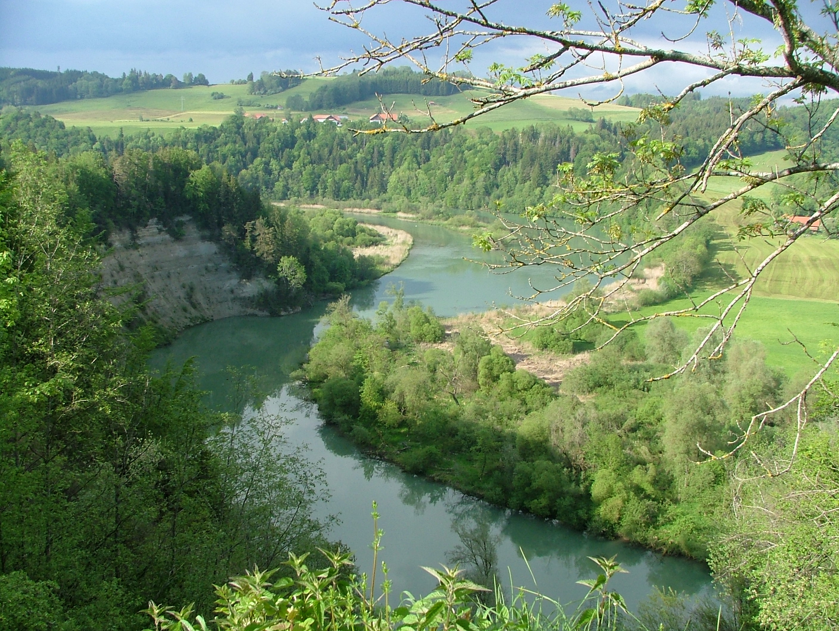 Altusried Illerdurchbruch